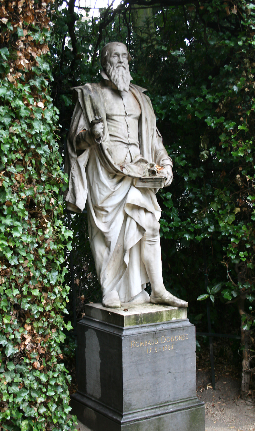 Rombaud Dodonee, Zavel, Brussels